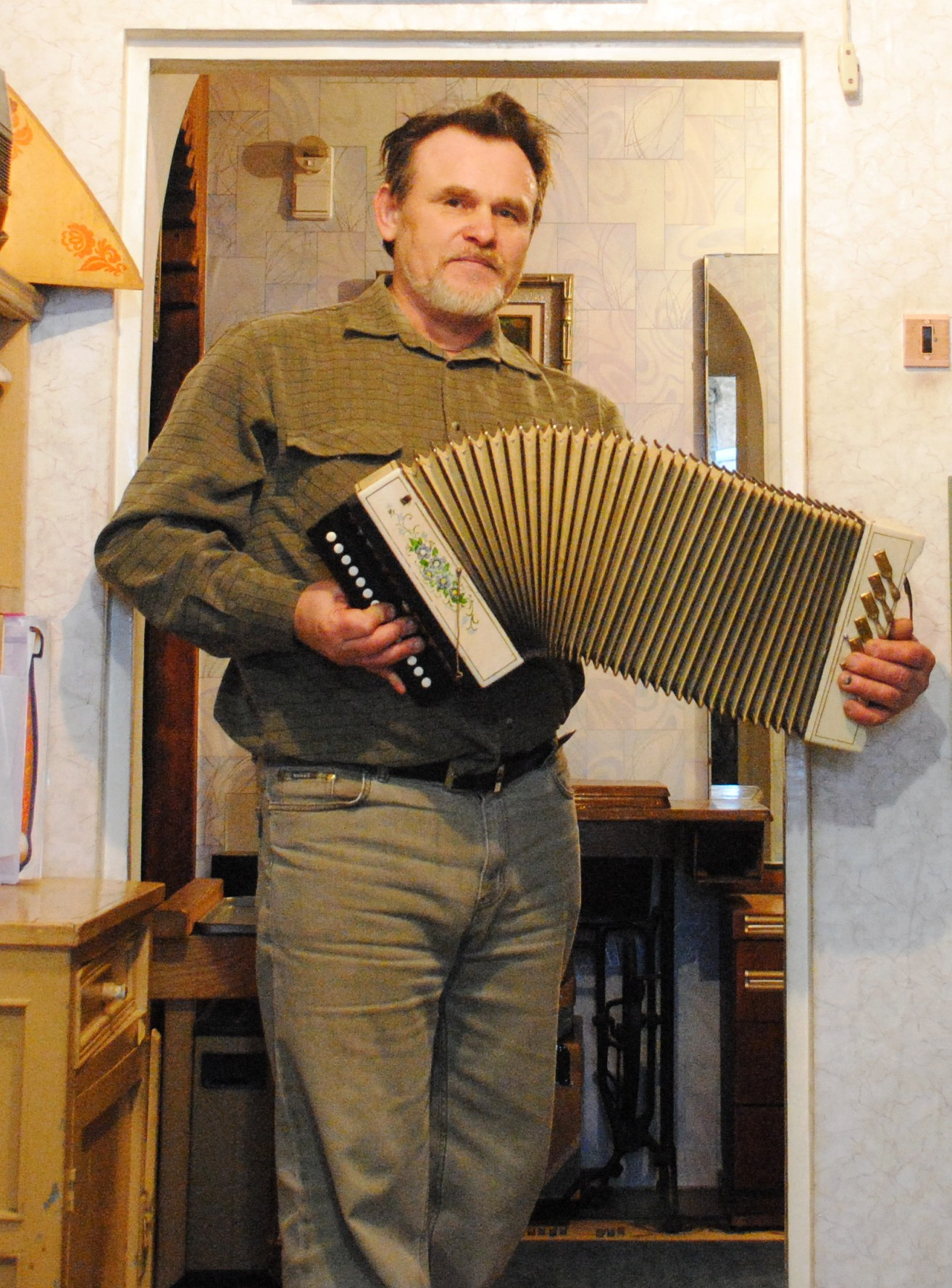 художник Раскат